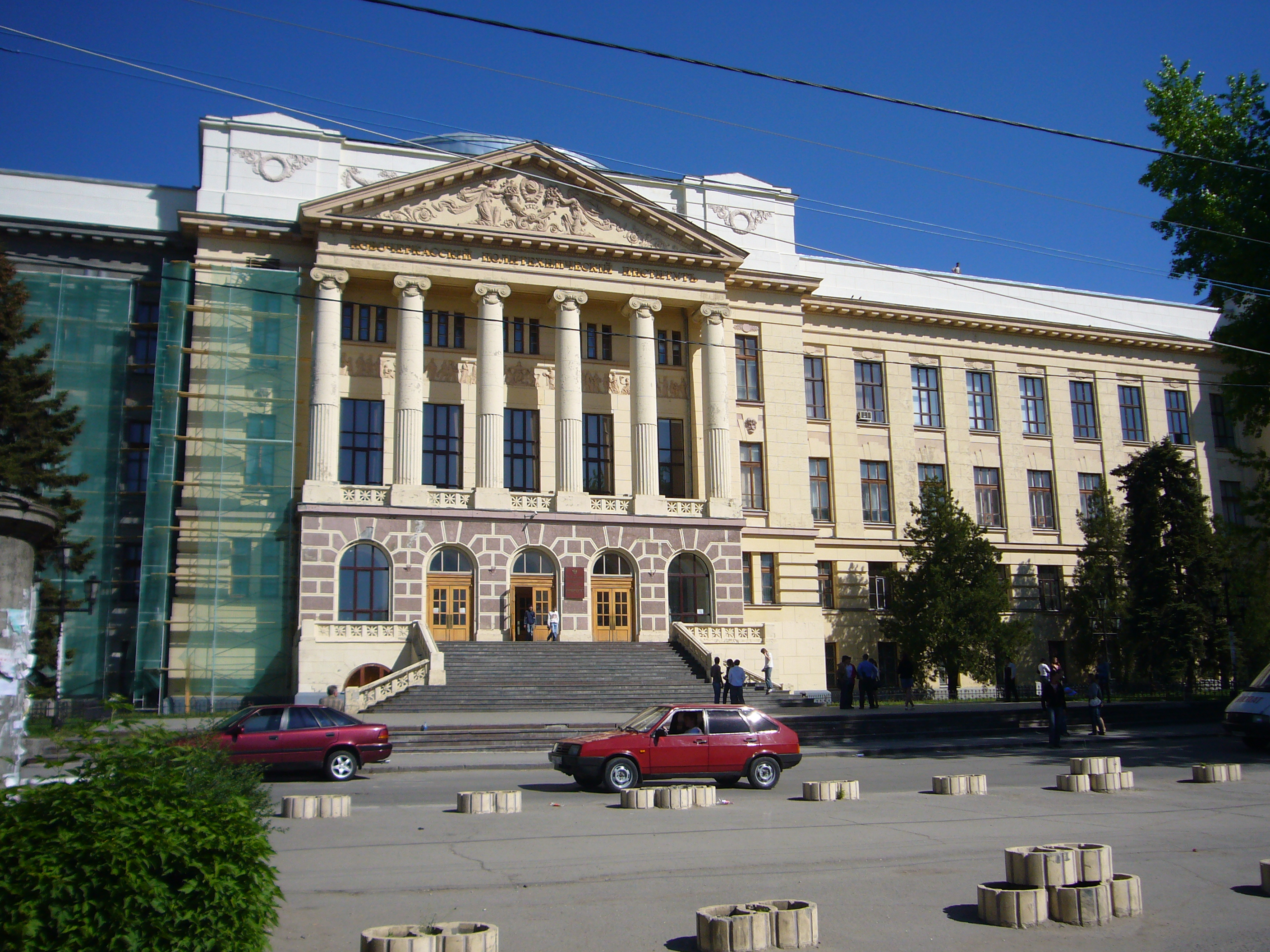 Hauptgebäude der Südrussischen Staatlichen Technischen Universität in Nowotscherkassk